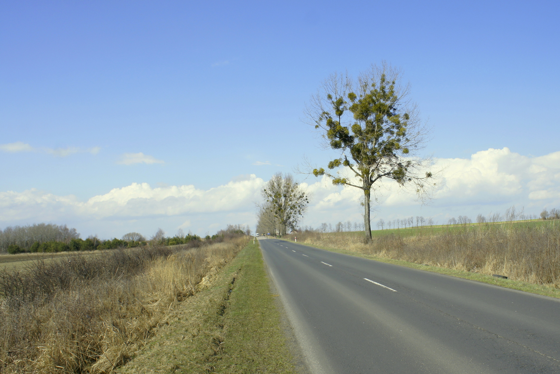 Drzewo porażone jemiołą. Droga wojewódzka nr 437 w powiecie śremskim